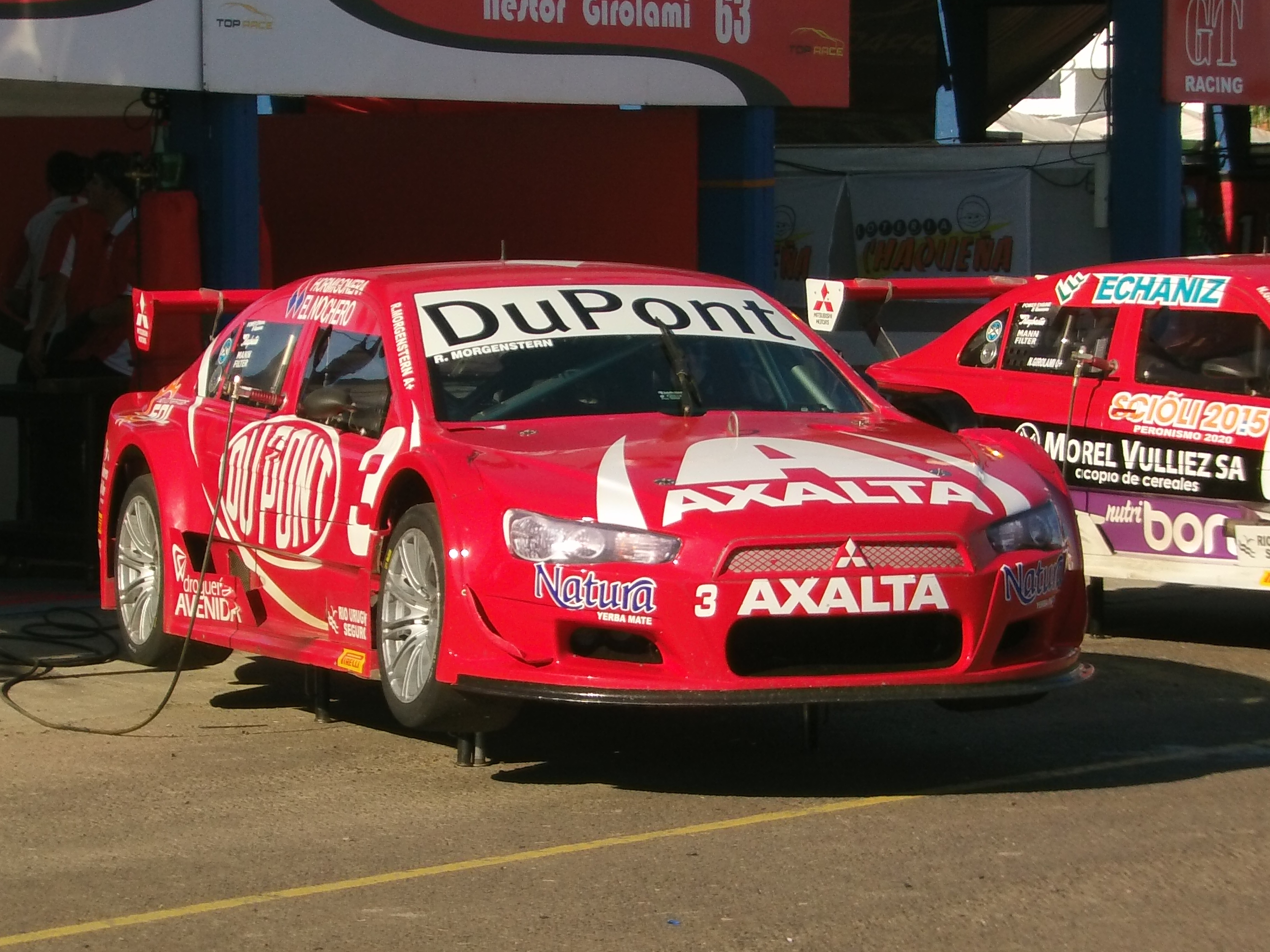 Unidad Mitsubishi Lancer GT TRV6 del equipo Mitsubishi Racing, de la categoría Argentina de automovilismo, Top Race V6